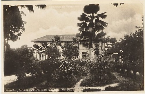 Lactuario de Maracay